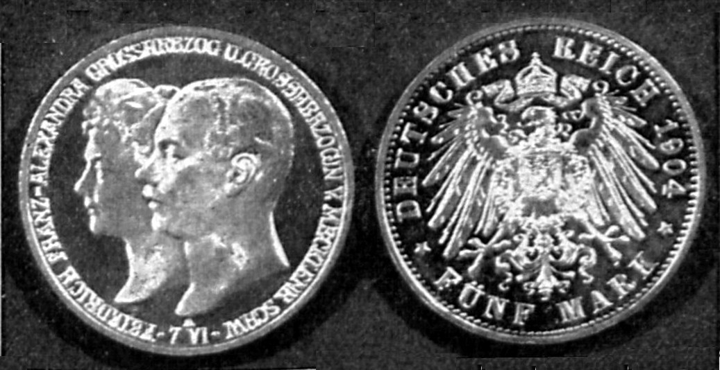 Fünfmarkstück, geprägt aus Anlaß der Hochzeit des Großherzogs Friedrich Franz mit der Prinzessin Alexadra von Cumberland.